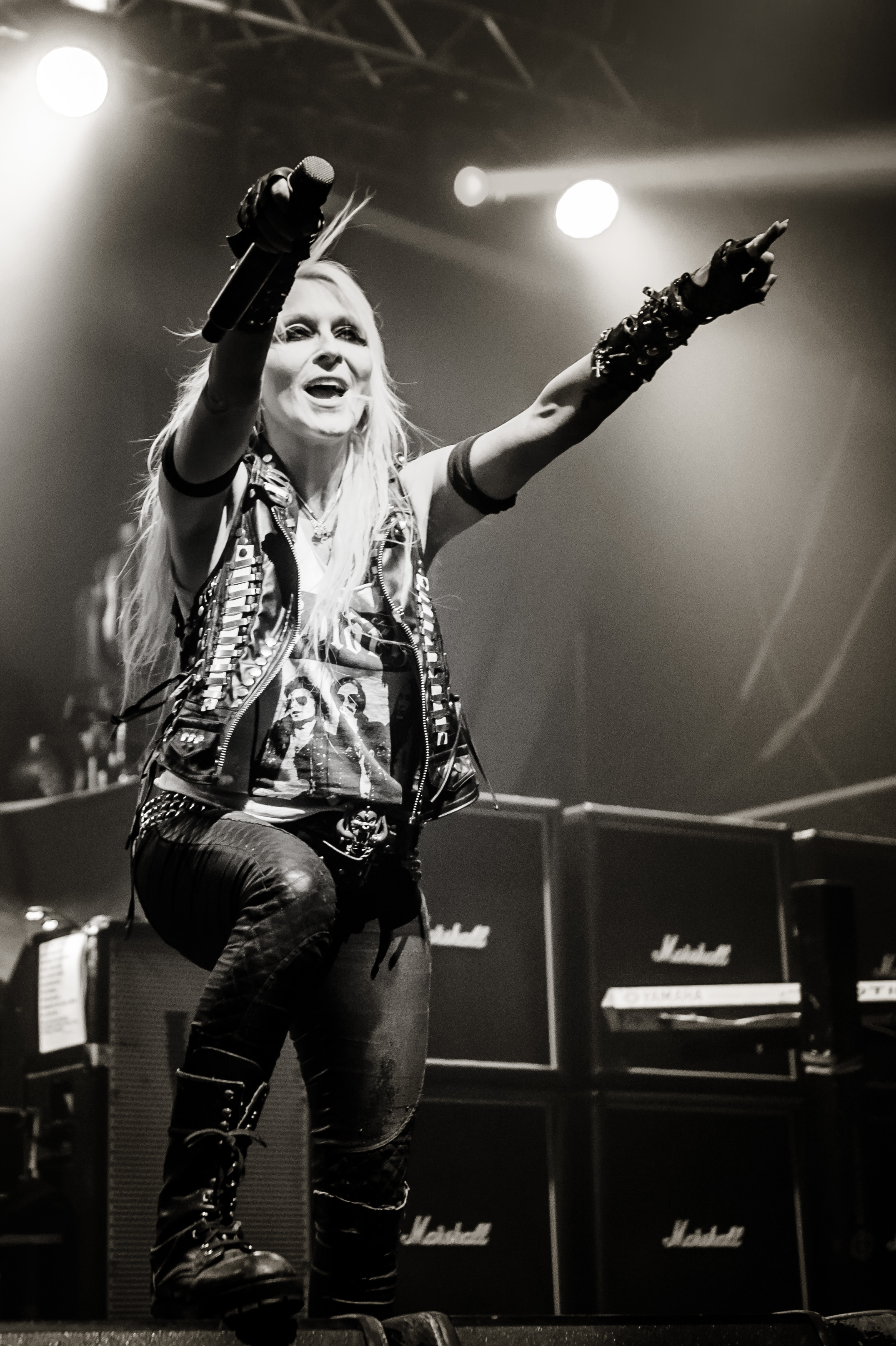 'Ruhrpott Metal Meeting 2017; Turbinenhalle Oberhausen': 'Doro'